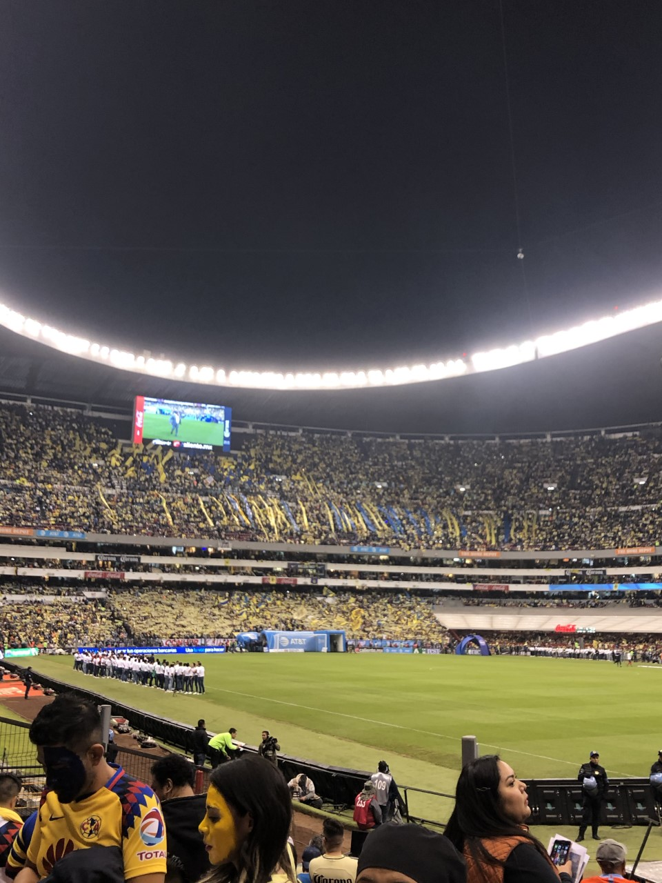 Afición del Estadio azteca final 2019, México